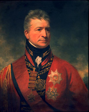 Gemälde: Der englische Generalleutnant Sir Thomas Picton (1758-1815)